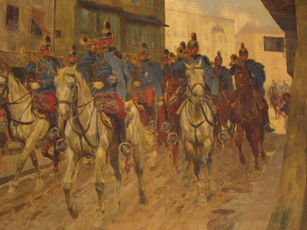 „Verklungene Fanfaren“. Dragoner des Niederösterreichischen Dragoner-Regiments „Friedrich August König von Sachsen“ Nr. 3 beim Abmarsch aus ihrer langjährigen Garnison Enns im Mai 1908